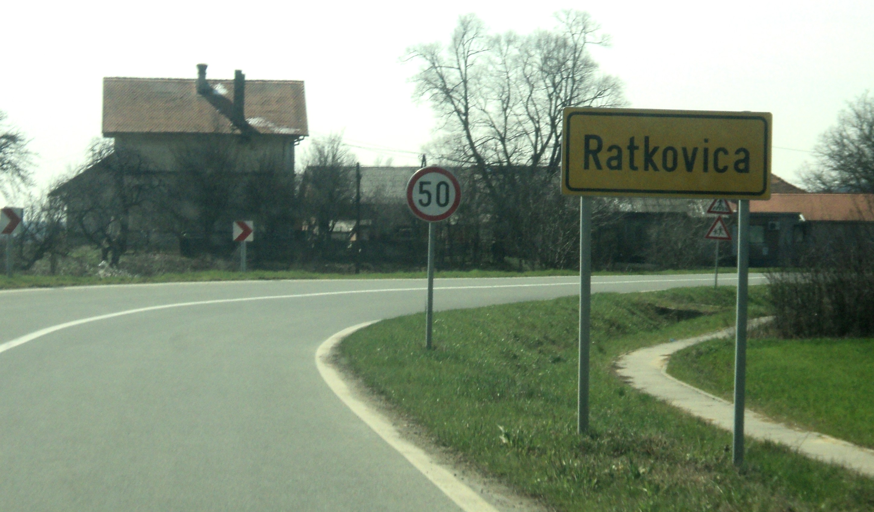 Ratkovica kod Pleternice